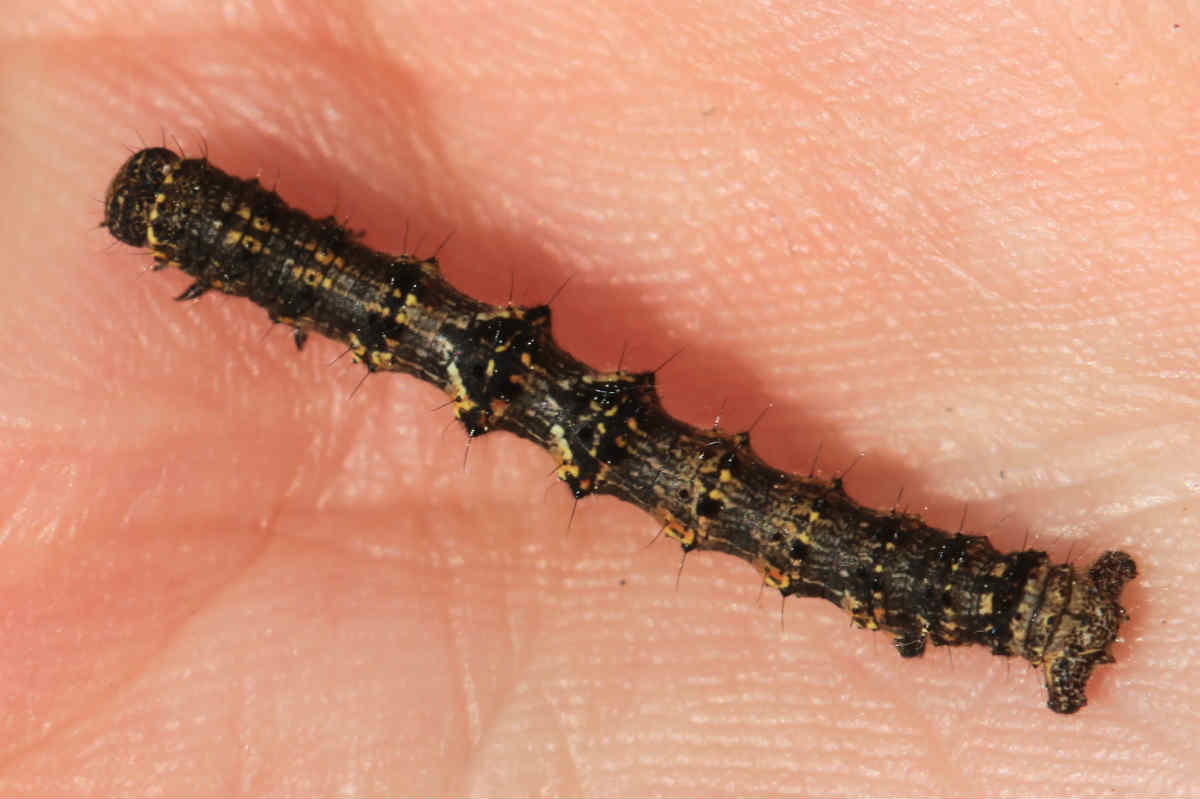 Jüngeres Raupenstadium des Schneespanners (Phigalia pilosaria) am 29.4.2017 in der Schwetzinger Hardt